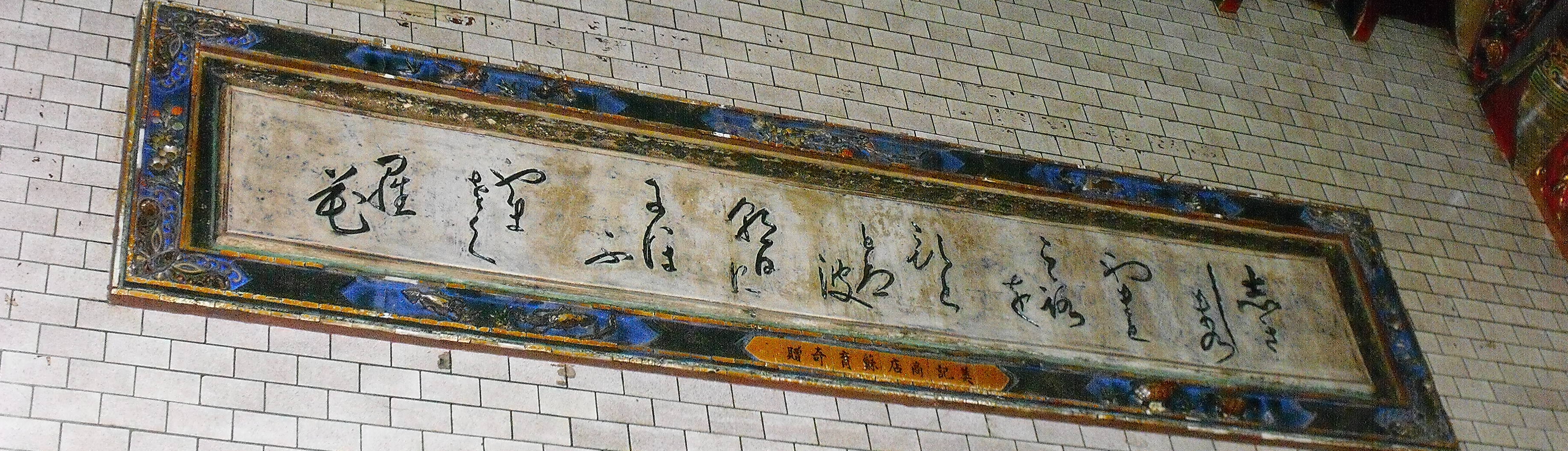 嘉邑城隍廟正殿和歌